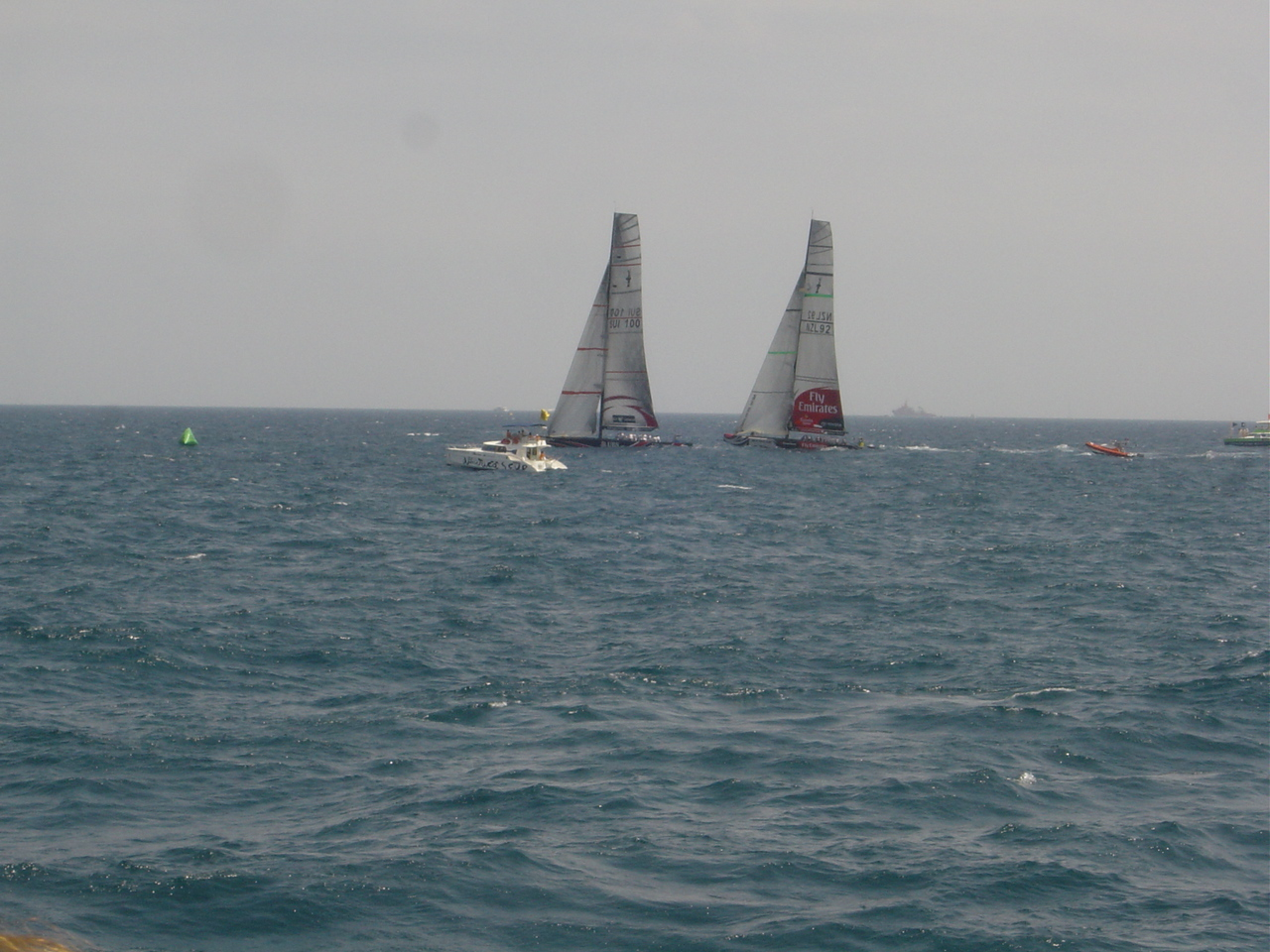 Alinghi et Team New Zealand lors de la première régate.